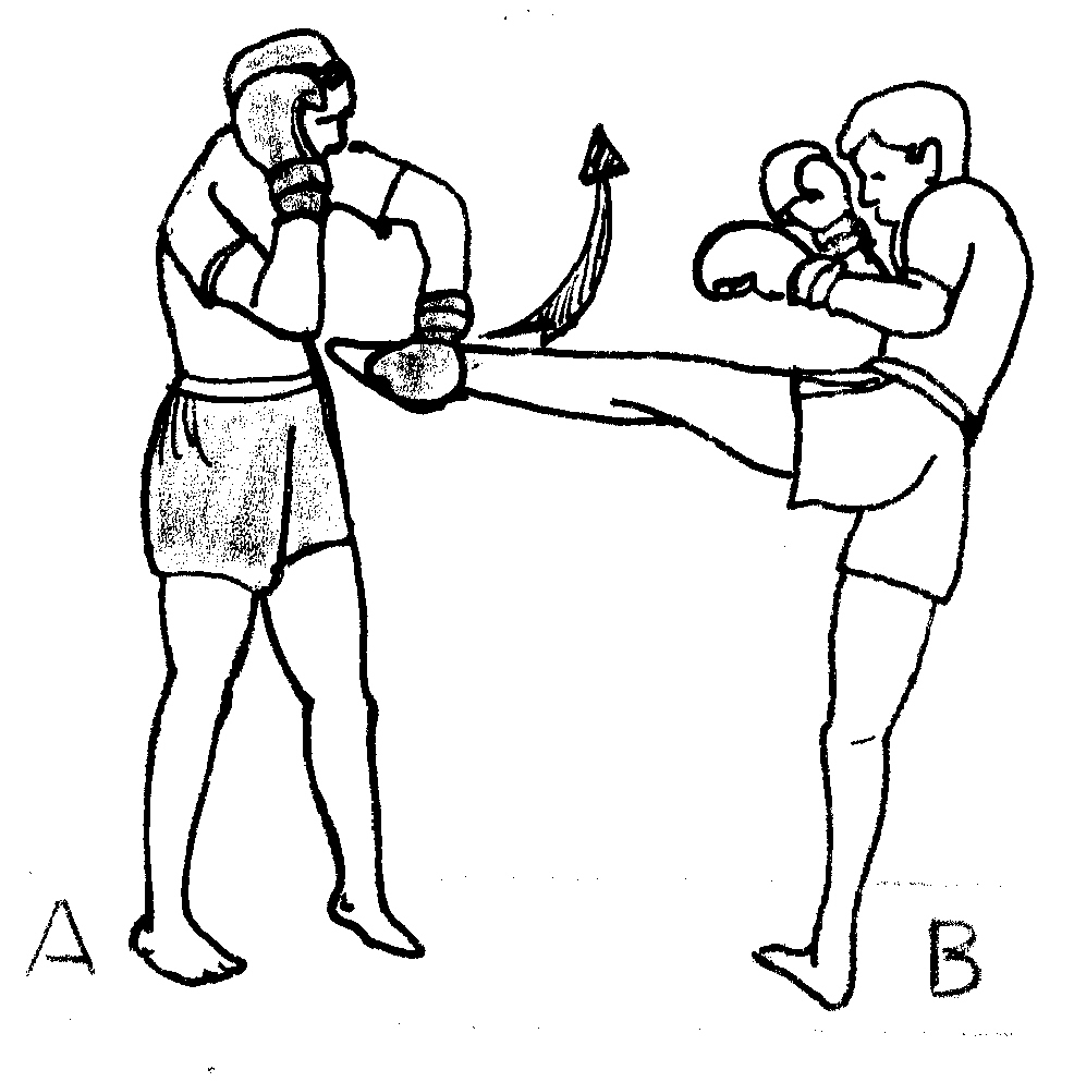 devie_front.jpg